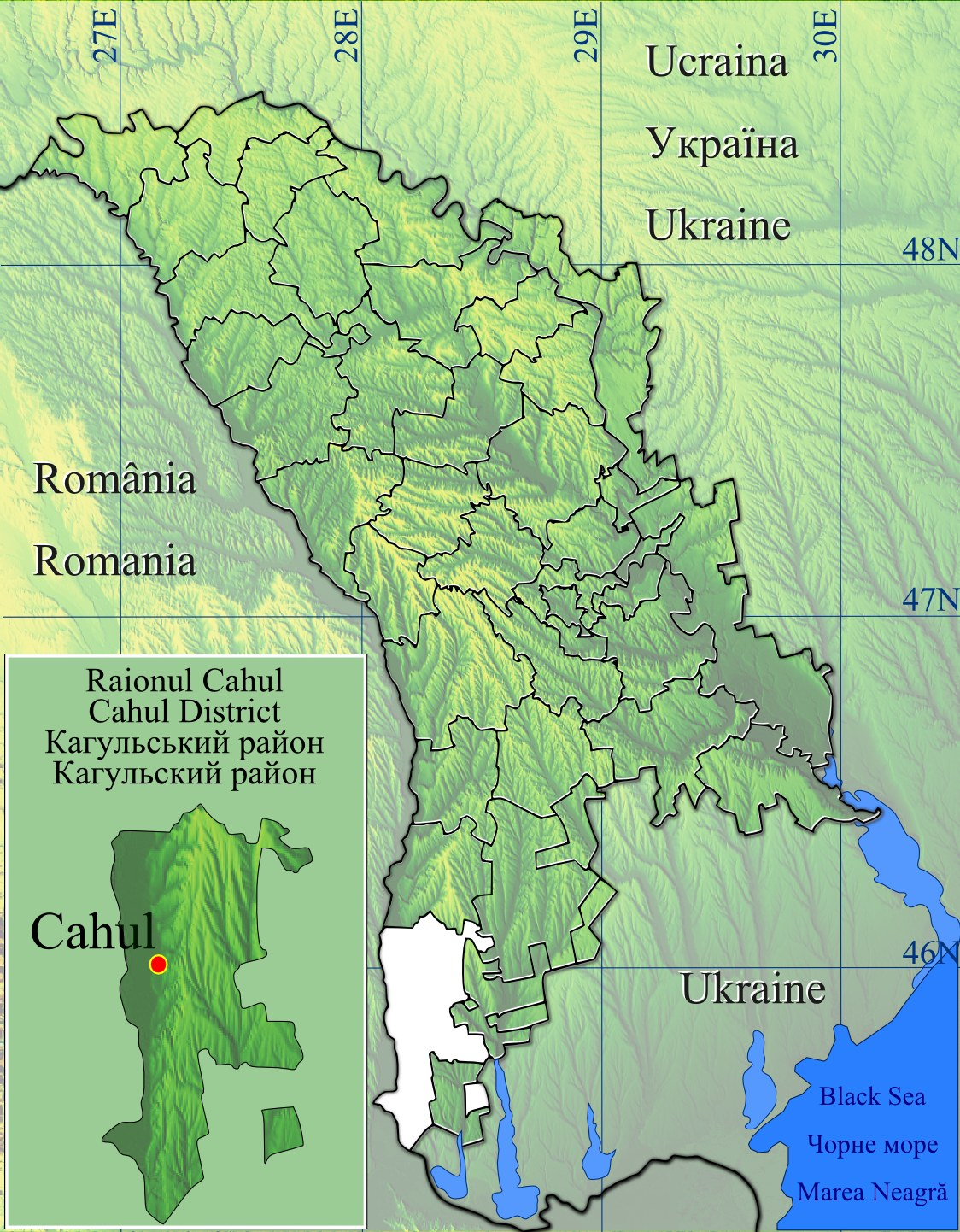 Harta de localizare a raionului Cahul din Republica Moldova. Geographic limits of the map : Left : 26.5 E Right : 30.5 E Top : 48.75 N Bottom : 45.25 N